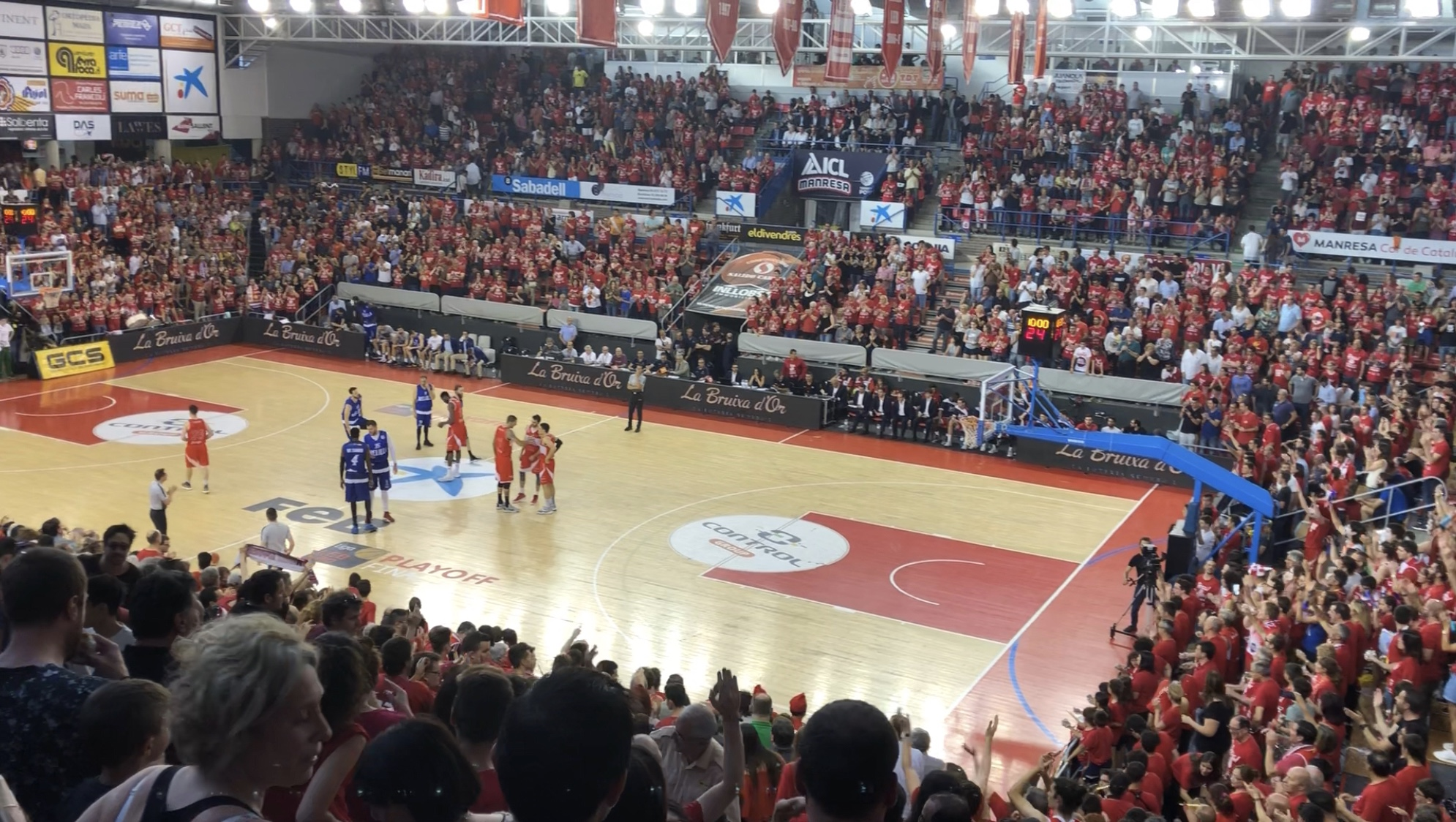 Instane del partido entre Manresa y Melilla (Playoff LEB Oro) el 12-06-2018